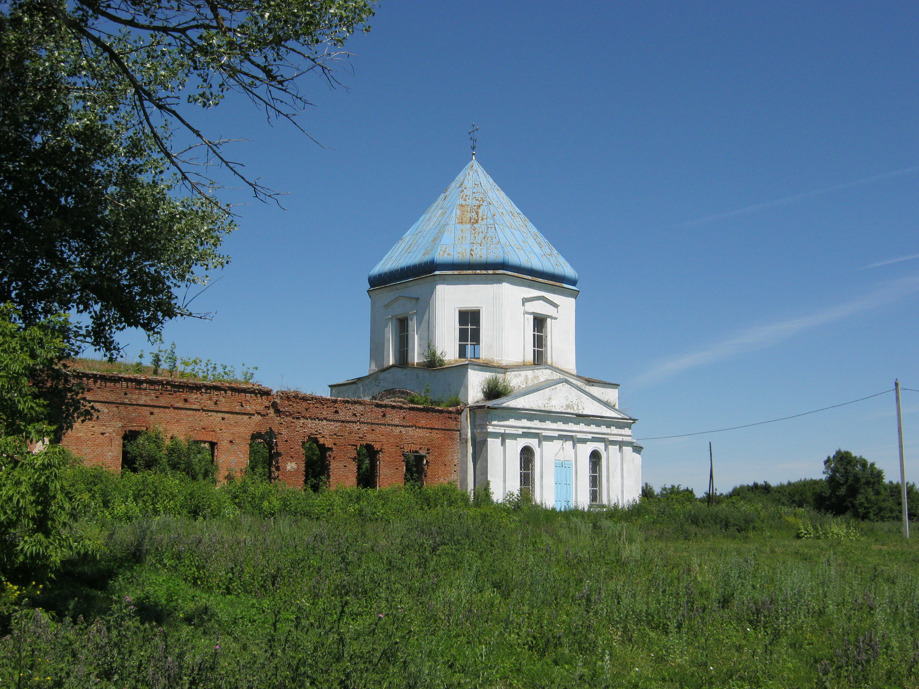 Церковь в с.Красный Лиман